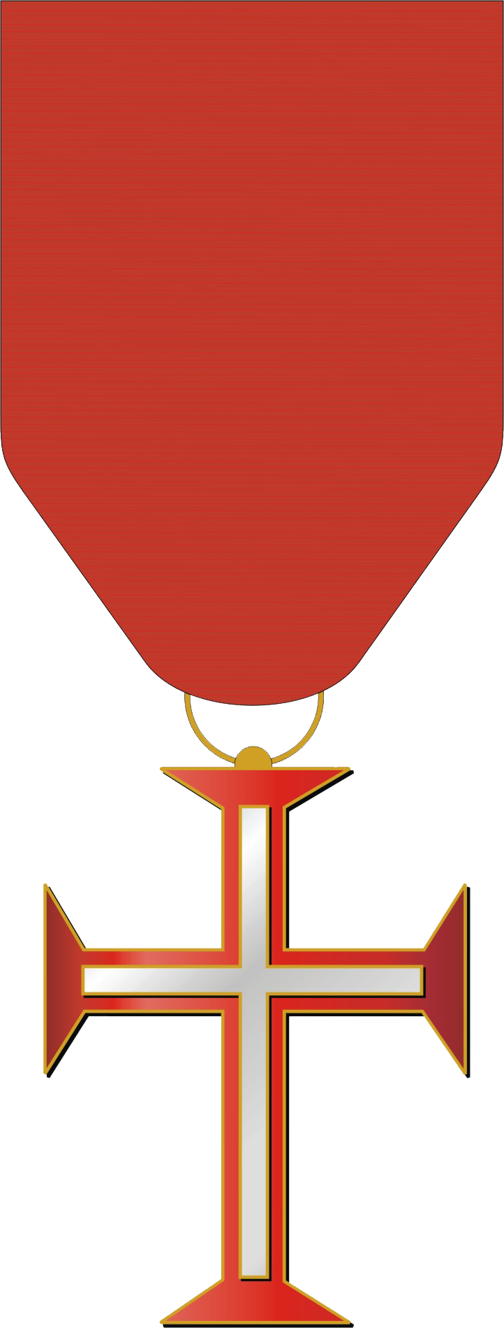 Condecoração da Imperial Ordem de Cristo - Grau de Cavaleiro.